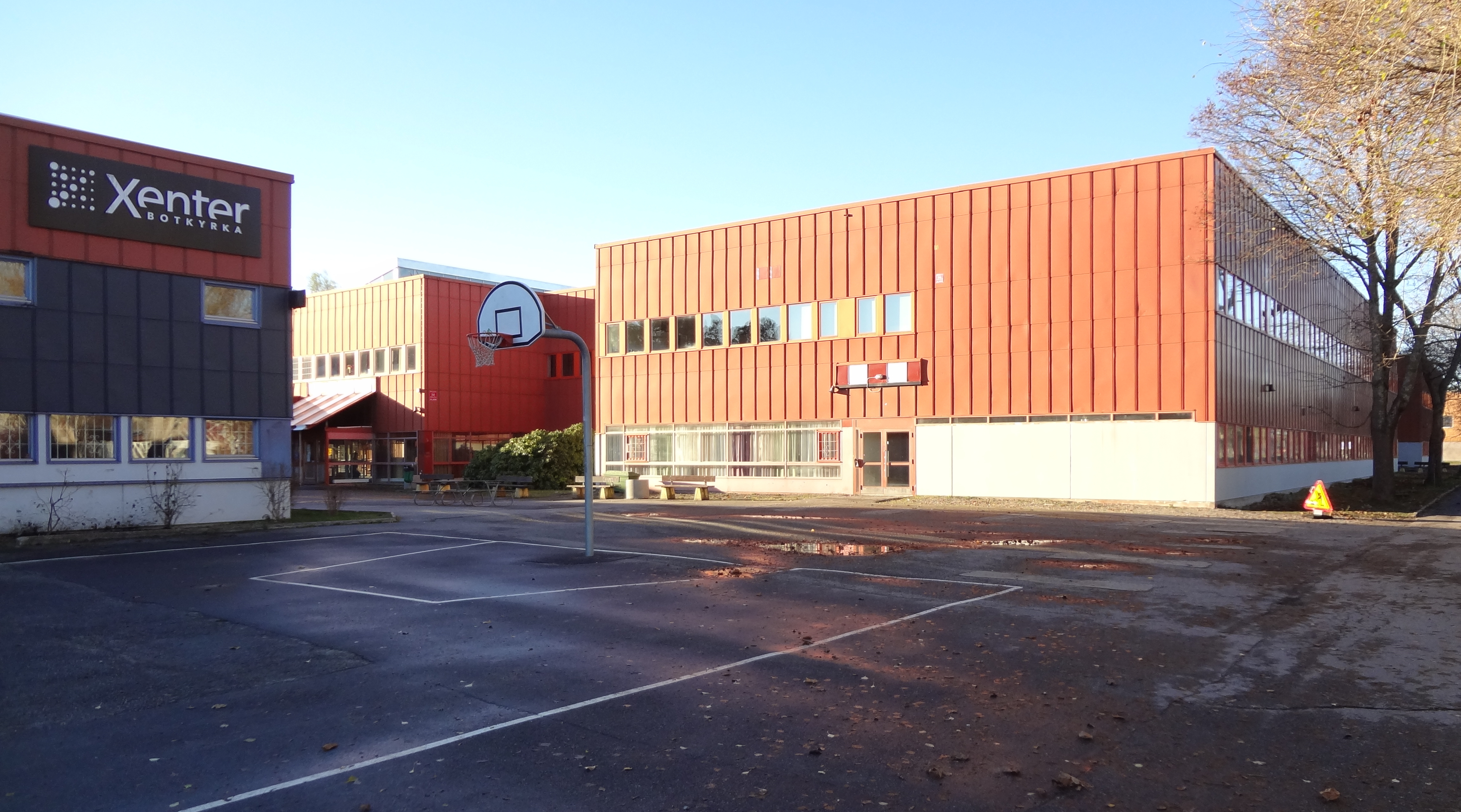 Tumba gymnasium med Xenter